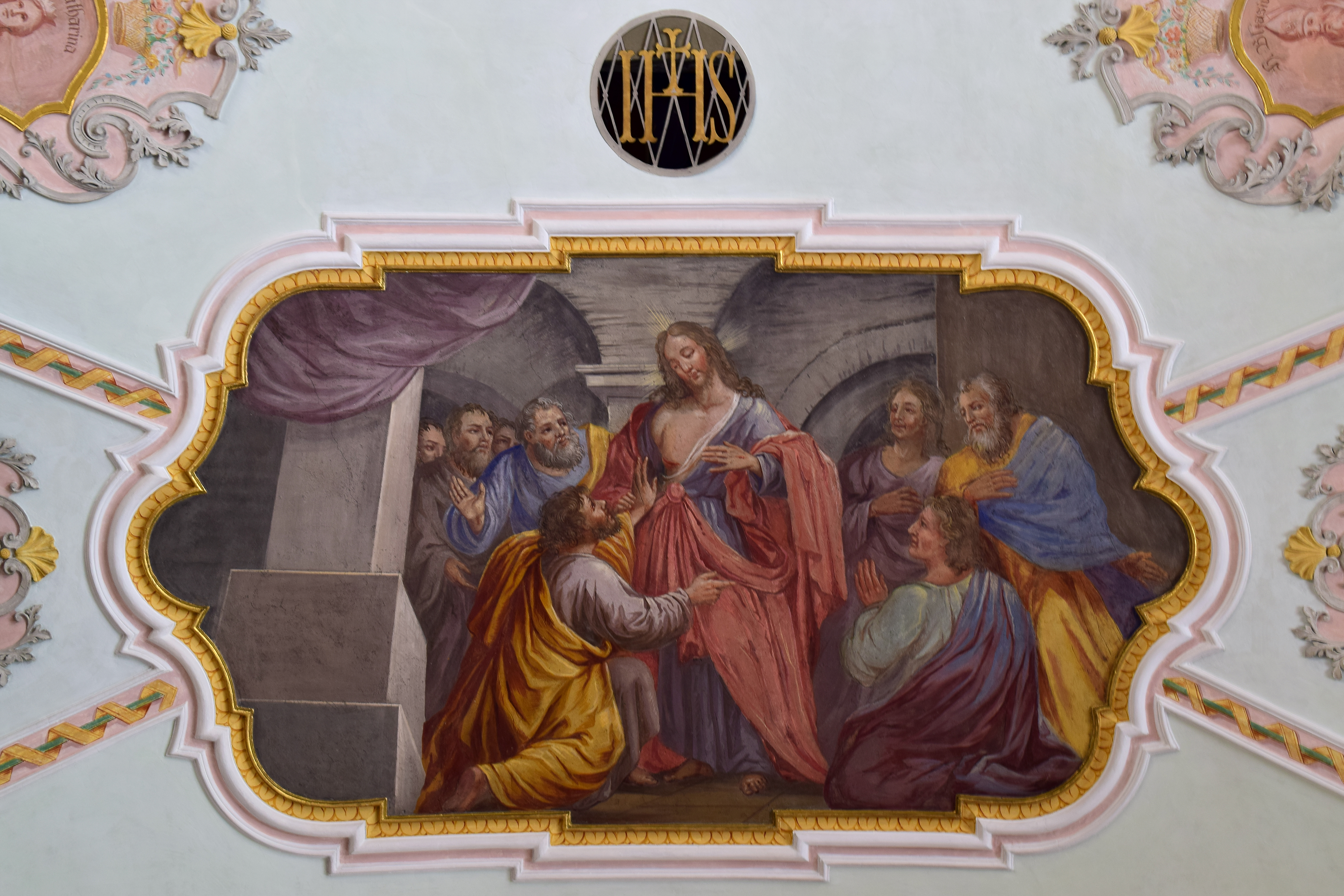 Kath. Pfarrkirche hl. Thomas mit Aufbahrungshalle